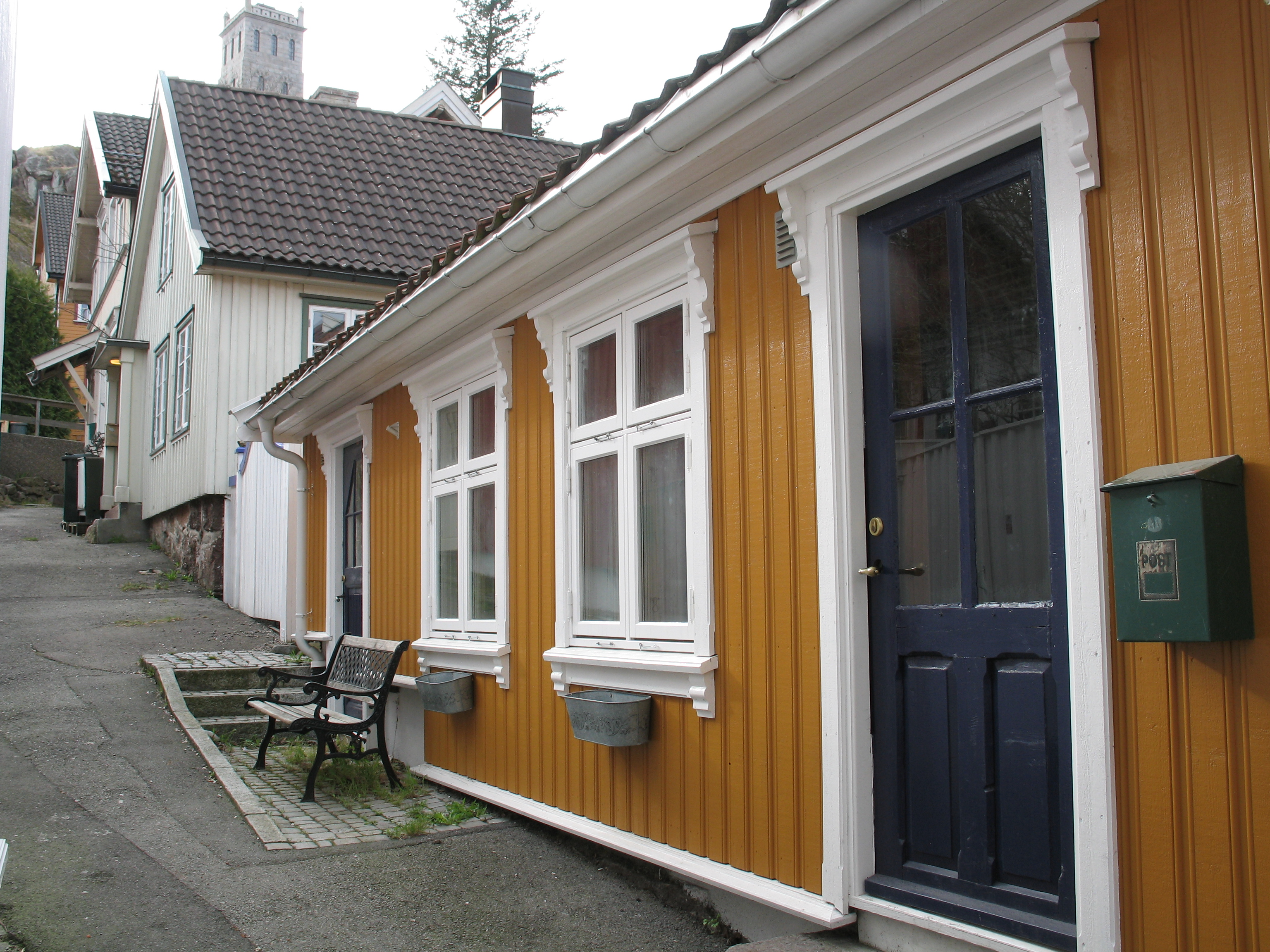 Dronning Blancas gate under Slottsfjellet i Tønsberg